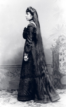 D'Helen Buchholtz a jonke Joeren.